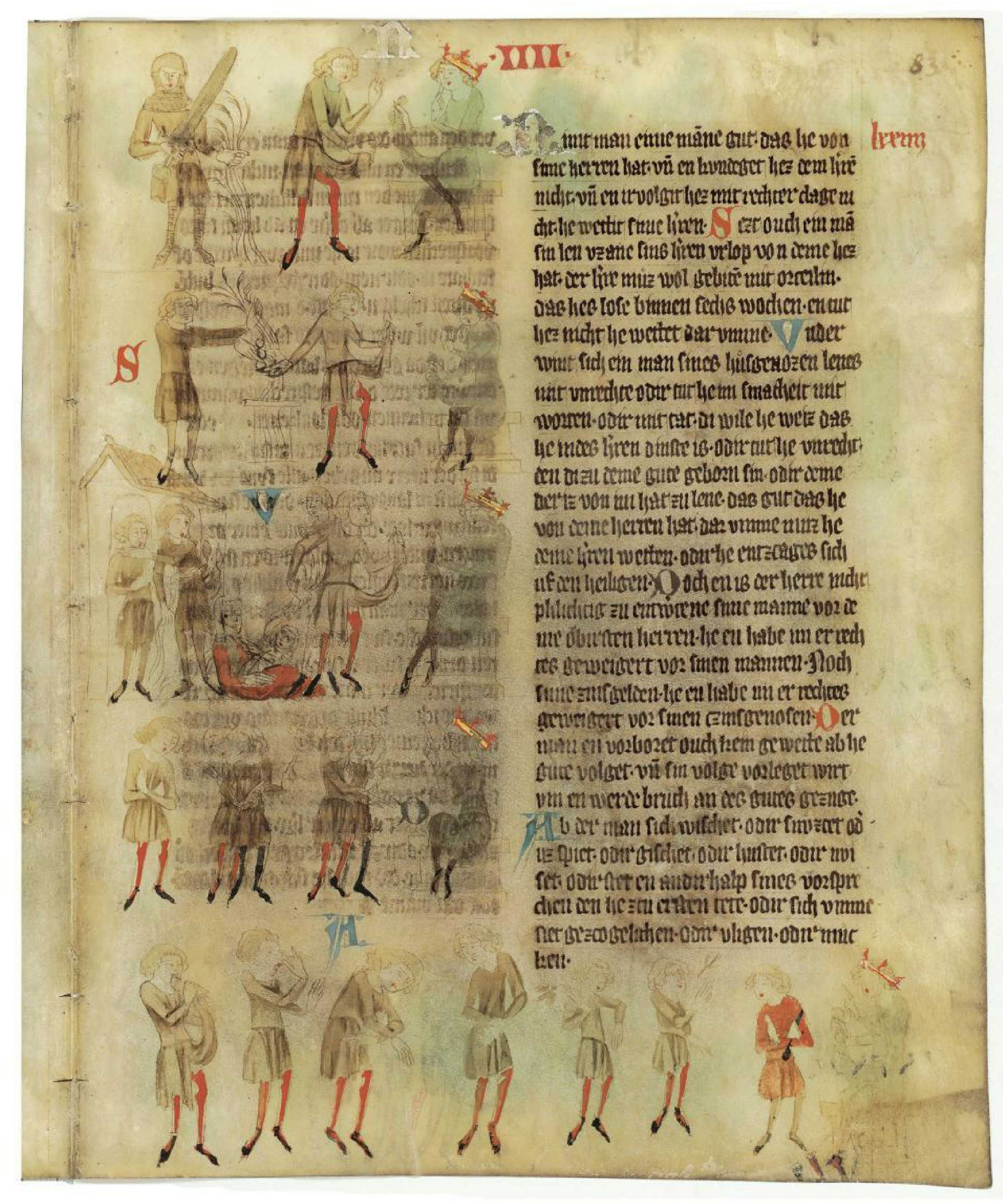 Blatt 83 des Dresdner Sachsenspiegels (Landrecht I) in der Faksimile-Ausgabe Karl von Amiras (Leipzig 1902)[1]: Die erste Miniatur illustriert die Zweischwerterlehre und die zweite das Steigbügelhalten des Kaisers für den Papst - eine Höflichkeitsgeste. Darunter sind Sitzungen geistlicher und weltlicher Gerichte dargestellt